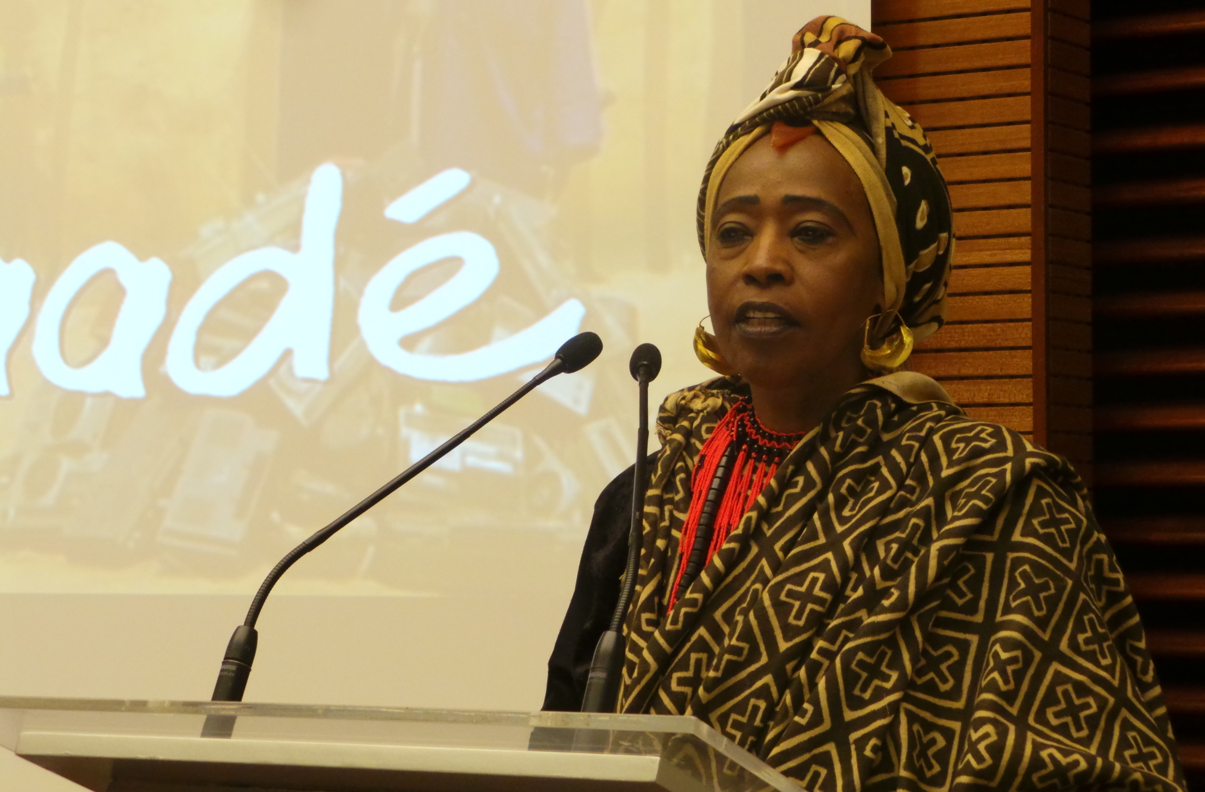 Jornadas convocadas por el Observatorio de Igualdad de Género de la Universidad Rey Juan Carlos. Madrid enero 2017. Fatoumata Coulibaly presenta su película Moolaadé